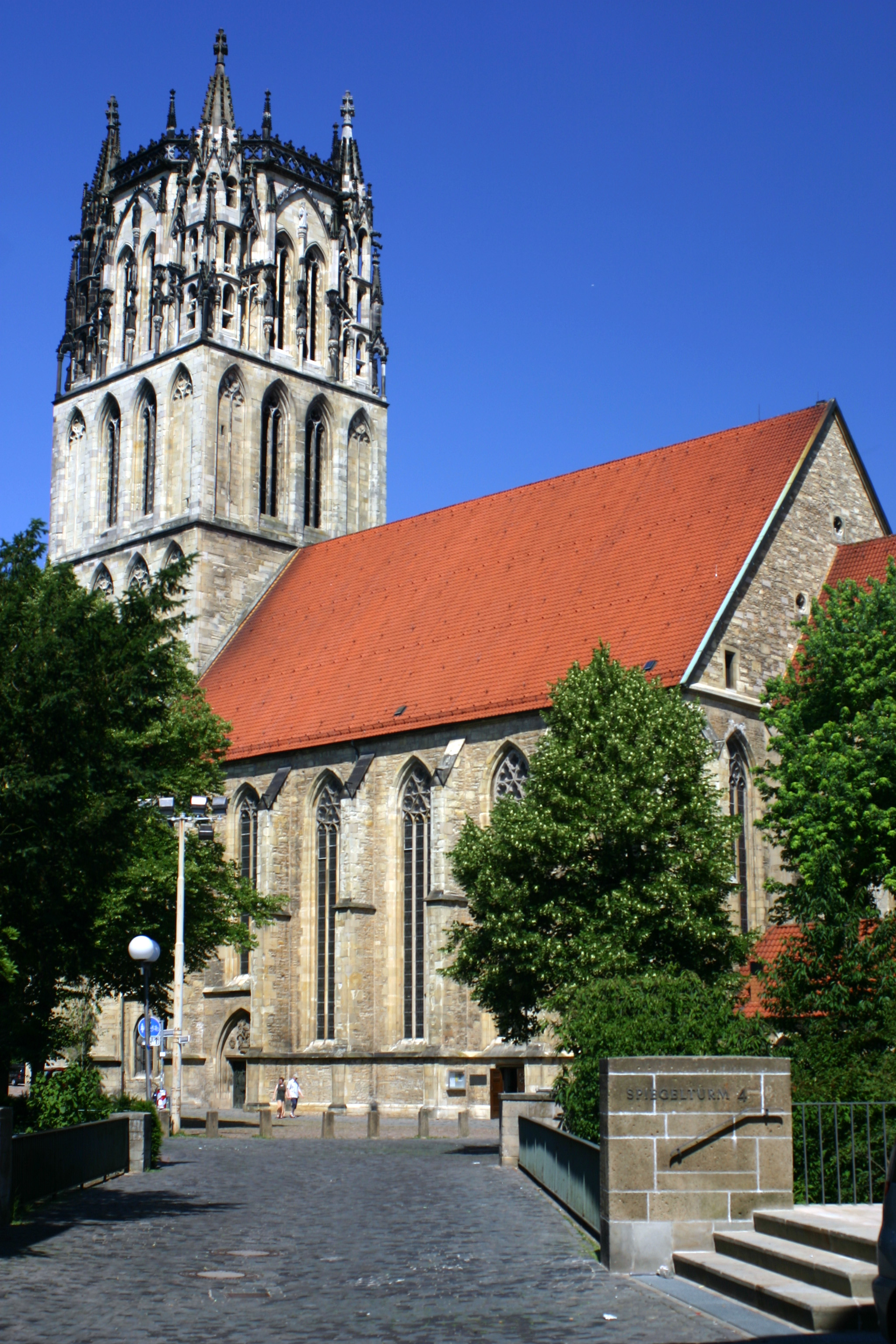 Münster, Überwasserkirche (Liebfrauen-Überwasser)